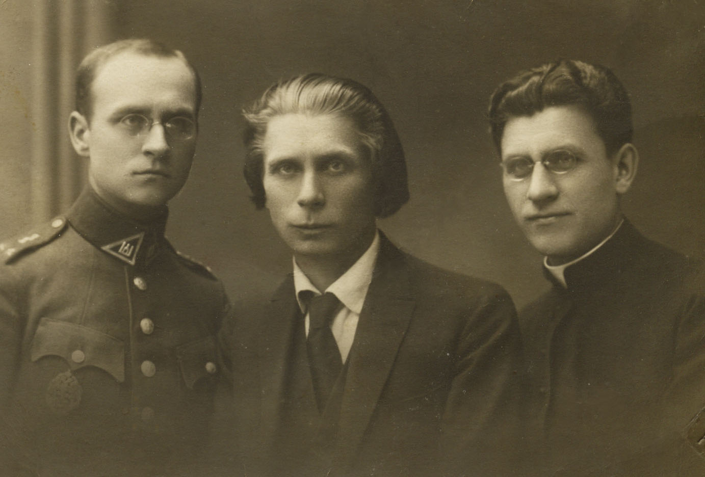 Broliai Vaičiūnai